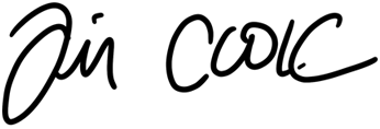 Подпись Тима Кука из публикации "Говоря о расизме" 2020 год